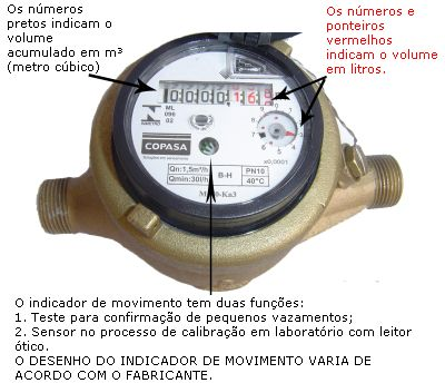 hidrômetro.jpg